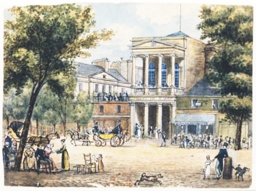 Boulevard Montmartre, Théâtre des Variétés. Plume, encre de Chine et aquarelle 6,9 x 9,3 cm, par Christophe Civeton (1796-1831), en provenance de la collection Hippolyte Destailleur.